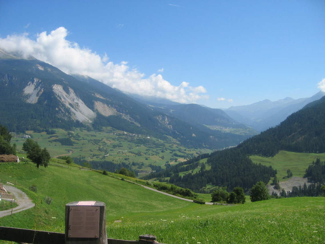 Blick von Mon in Richtung AlbulatalRumantsch: Vista da Mon an direcziun Val Alvra